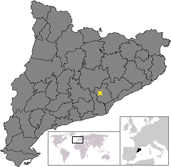 Terrassa, Catalonia location